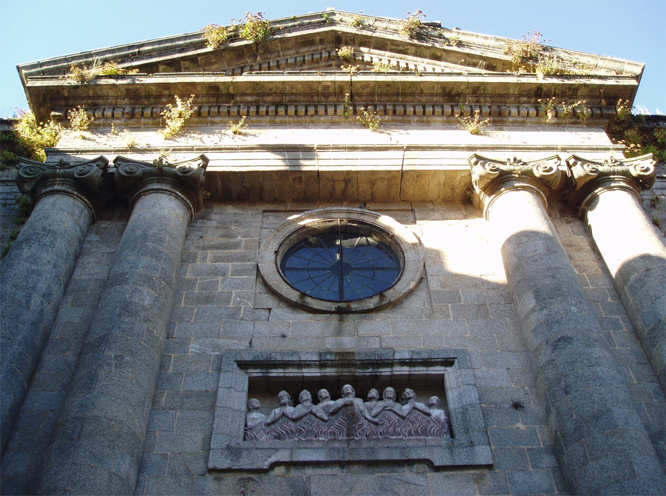 Capilla de Ánimas (S. XVIII), en Santiago de Compostela, España.